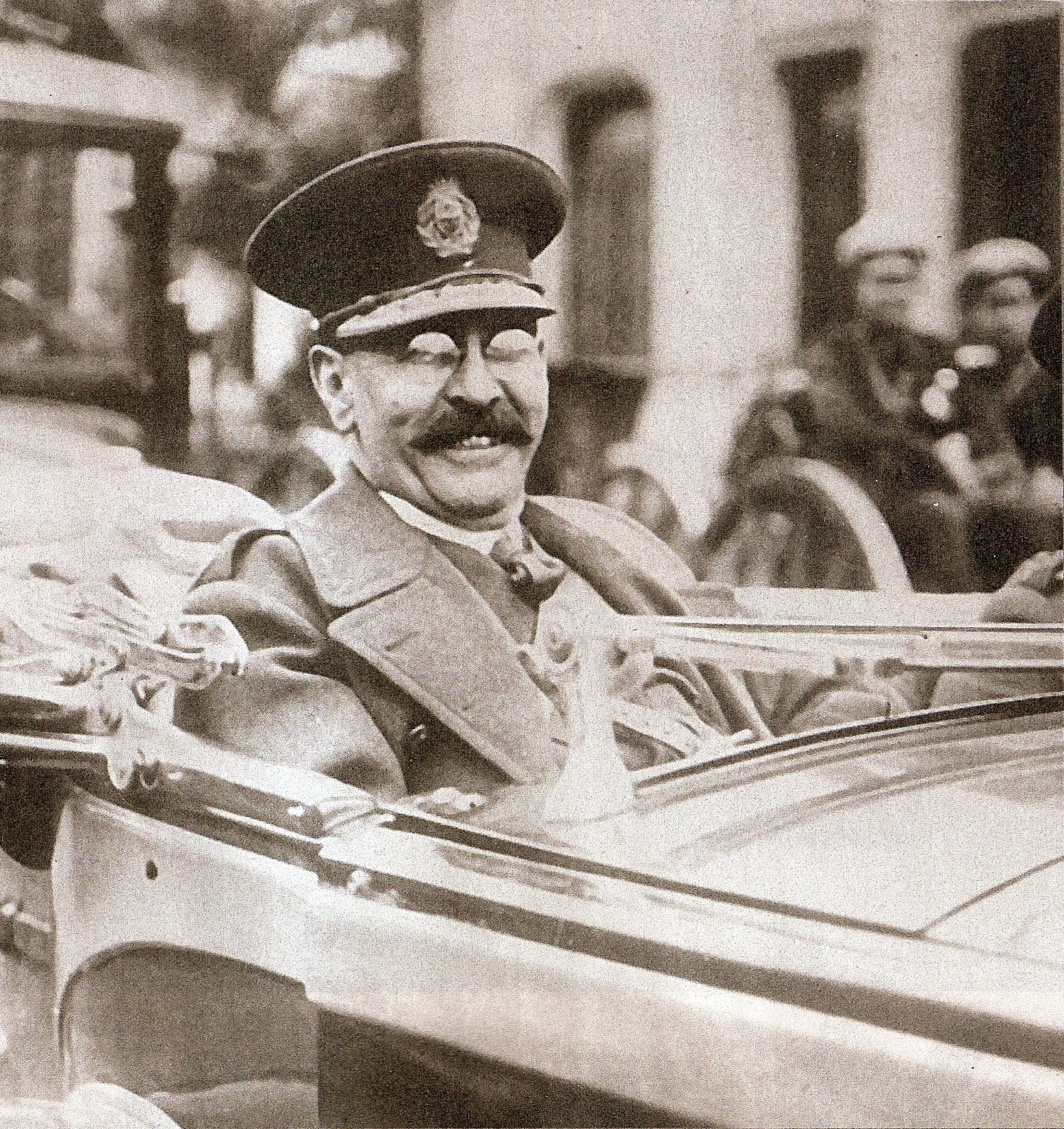 Presidente de Facto Felix Uriburu